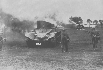 Танки горіли, як свічки